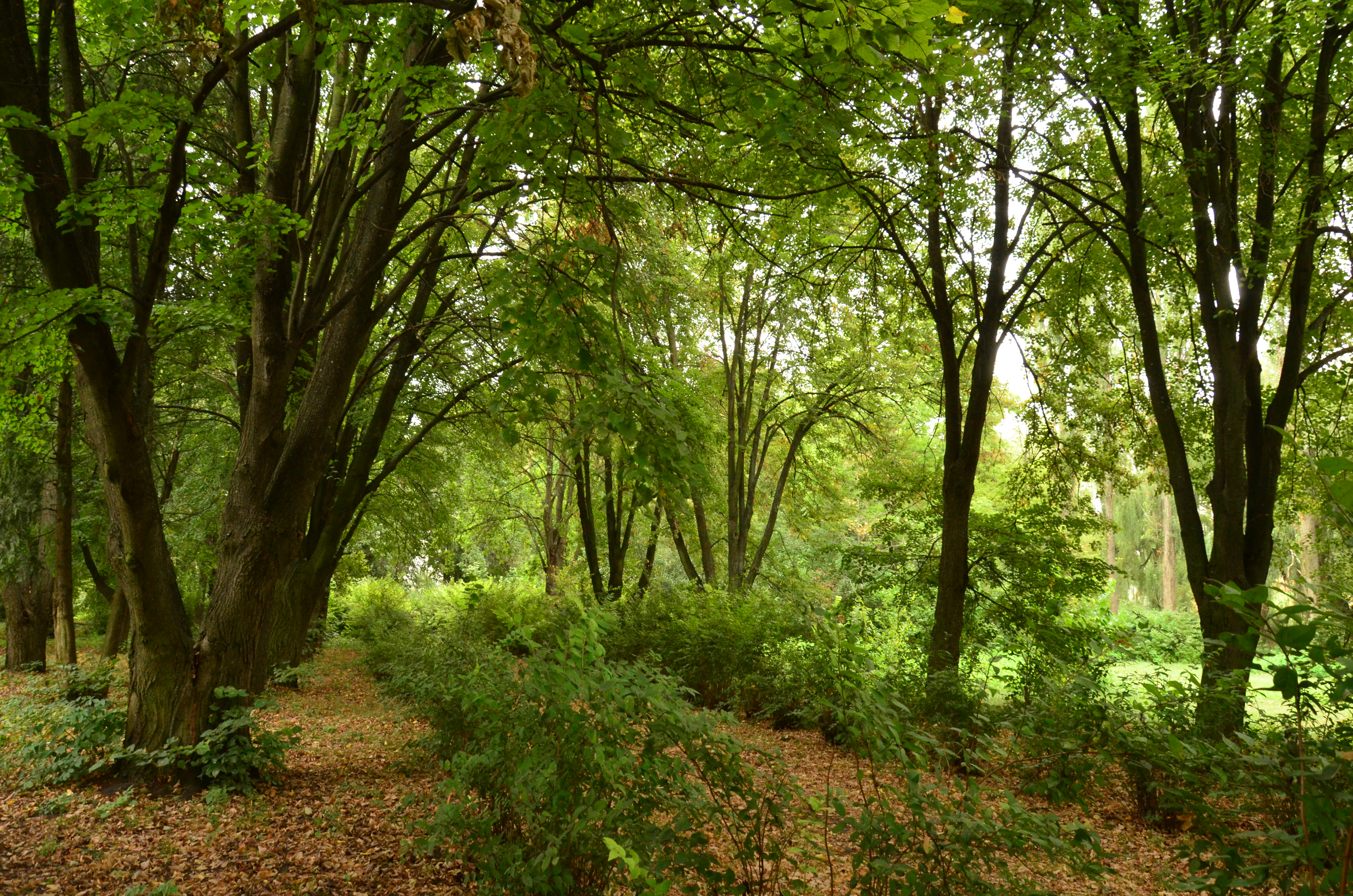 Садиба співака І. С. Козловського, село Мар'янівка, вул. Шкільна, 3